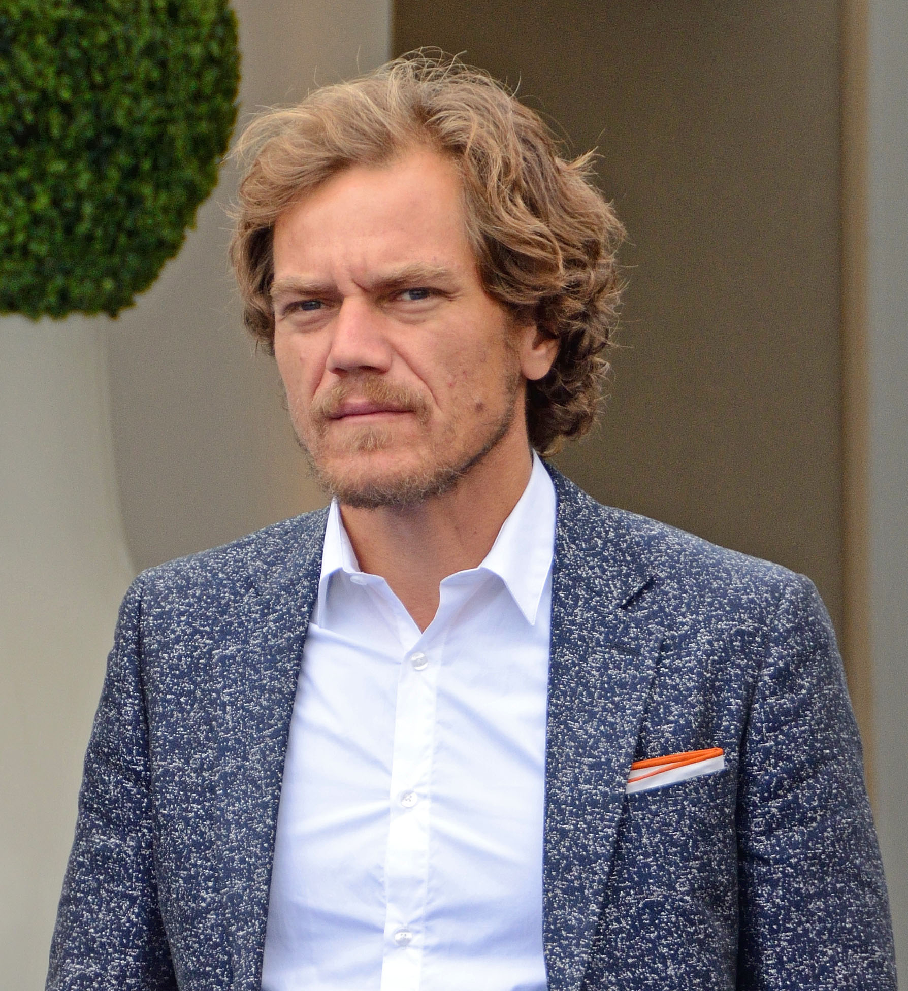 Michael Shannon